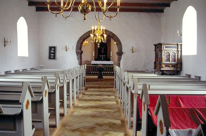 Vindblæs Kirke (Vesthimmerlands Kommune) i Danmark. Skibet set mod øst